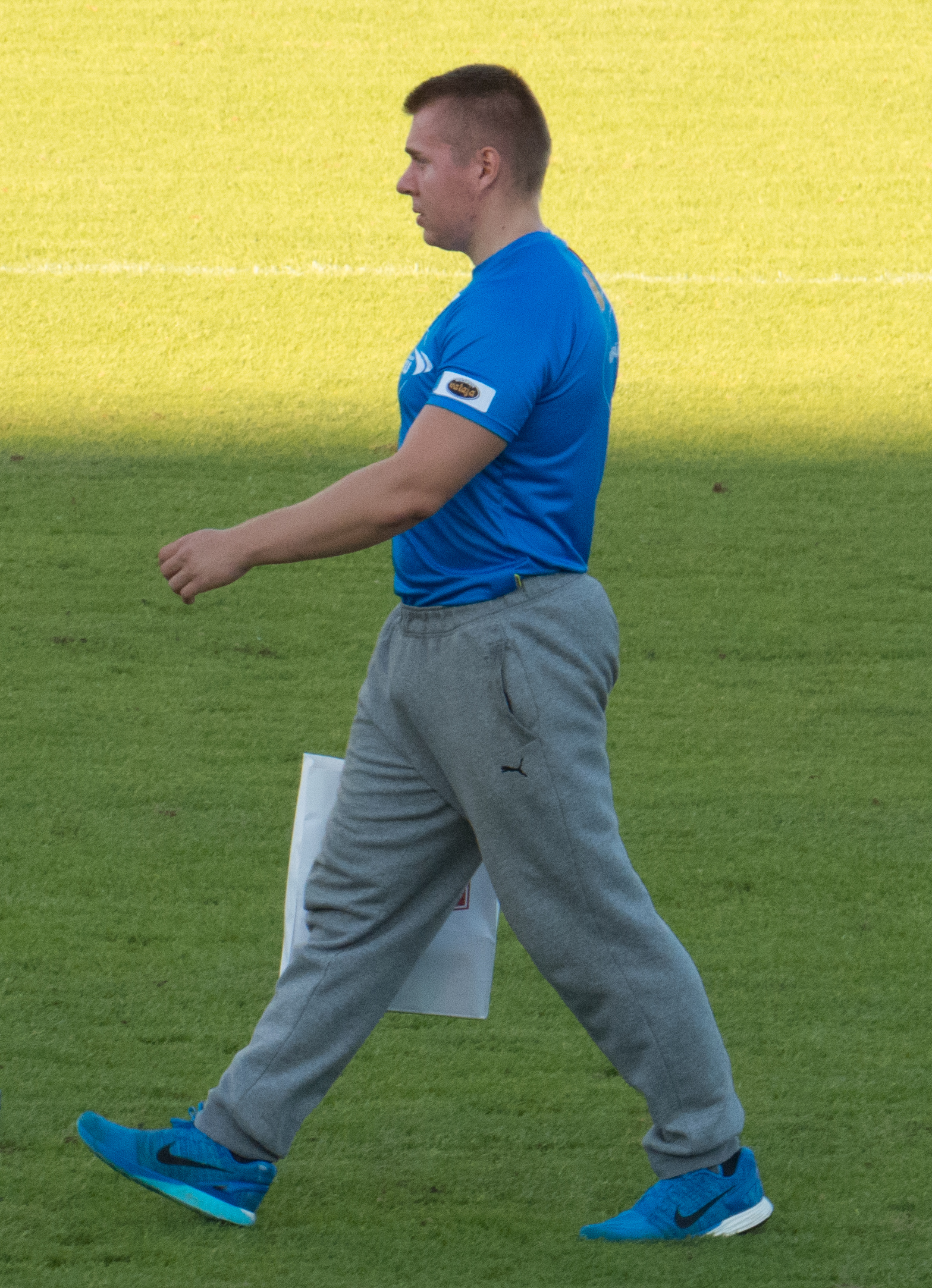 Arttu Kangas, suomalainen kuulantyöntäjä vuonna 2016.